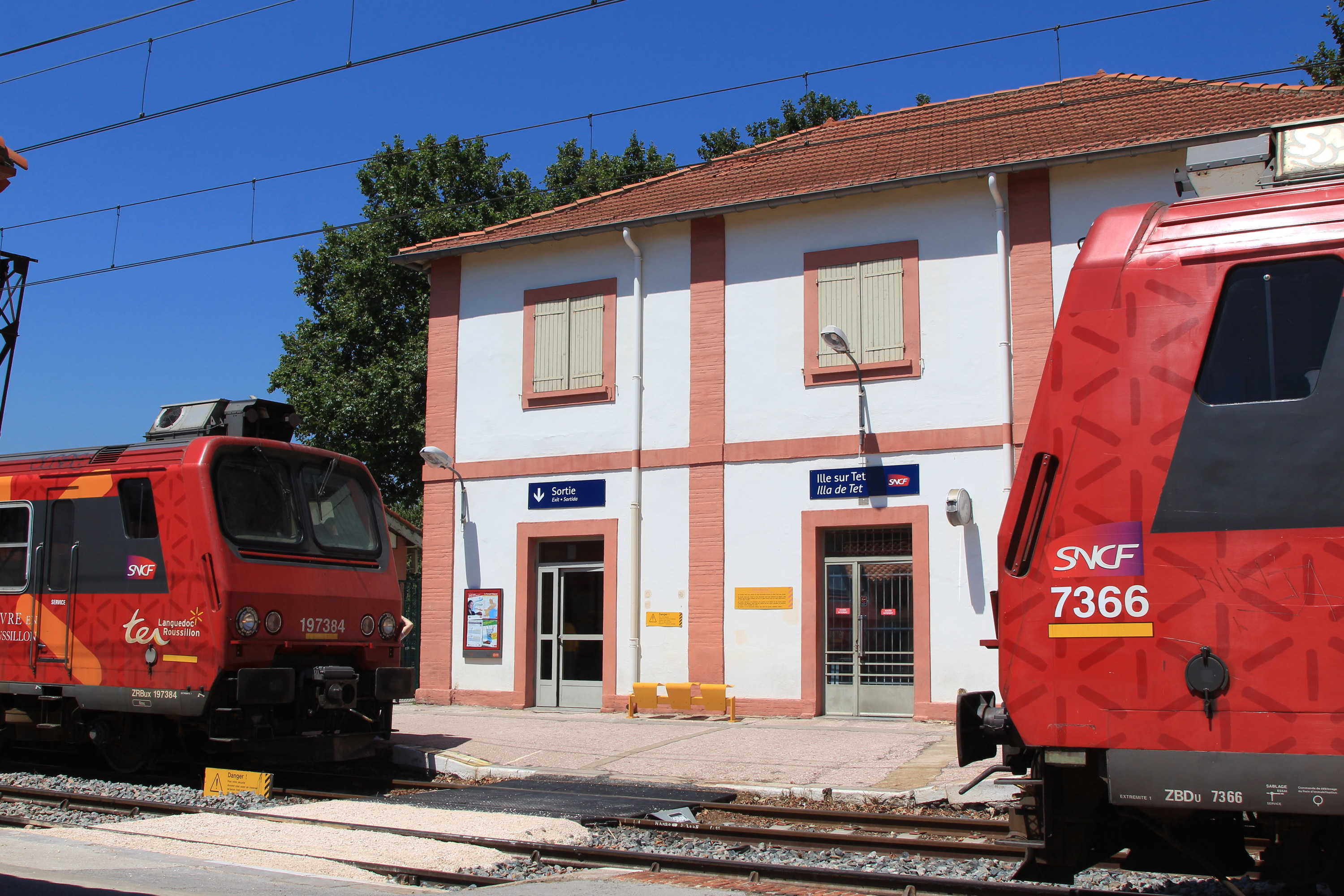 Croisement de deux Z2 (Z 7366 faisant Perpignan - Villefranche au TER n°877657 et Z7384 faisant Villefranche - Perpignan au TER n°877656) en gare d'Ille-sur-Têt.